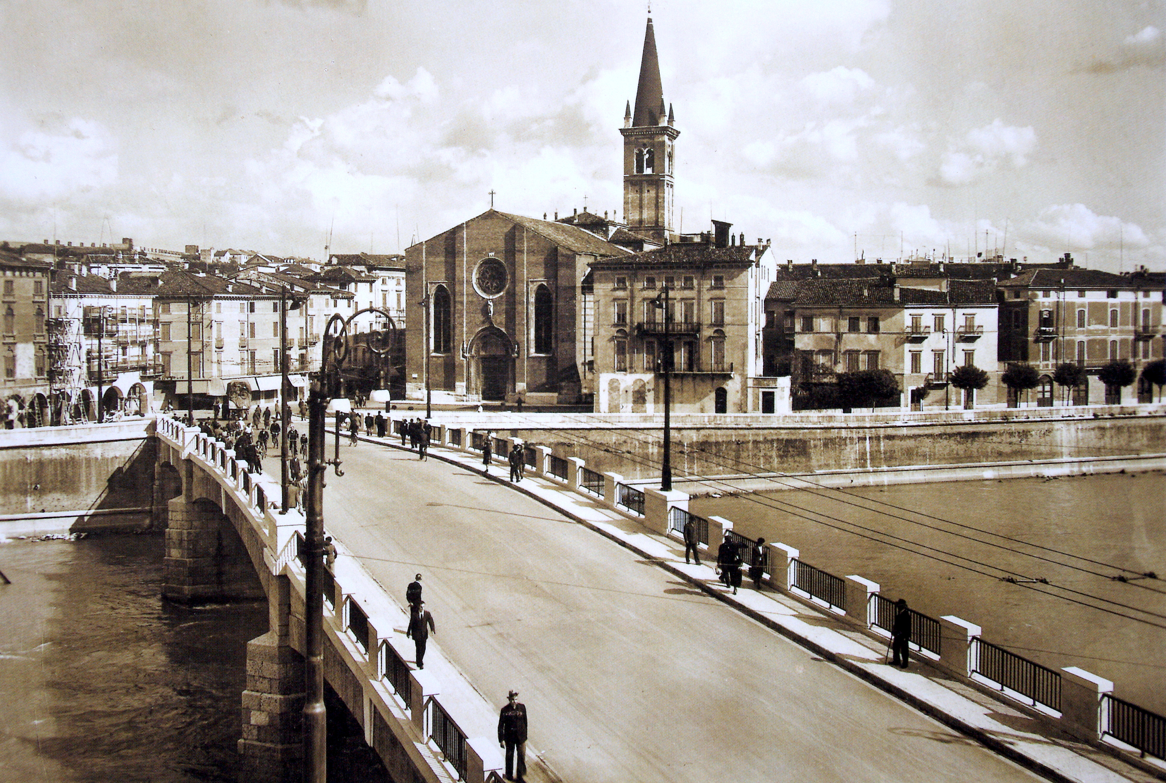 Il ponte Umberto di Verona nel 1940.